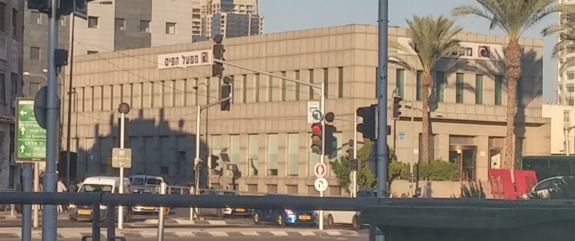 בית מפעל הפיס ברחוב המסגר פינת לה גוארדיה, דצמבר 2016